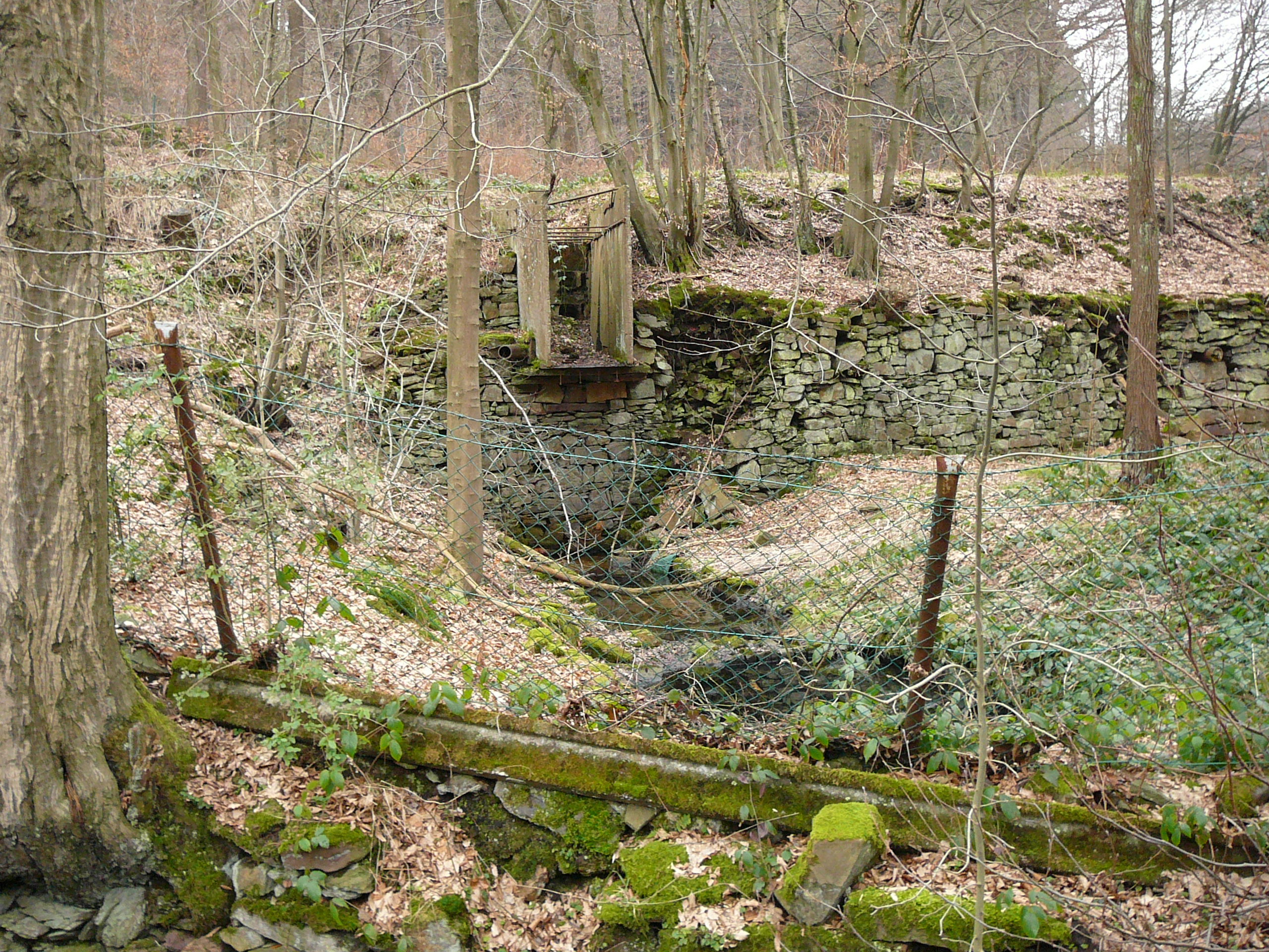 Zillertaler Straße, Wuppertal